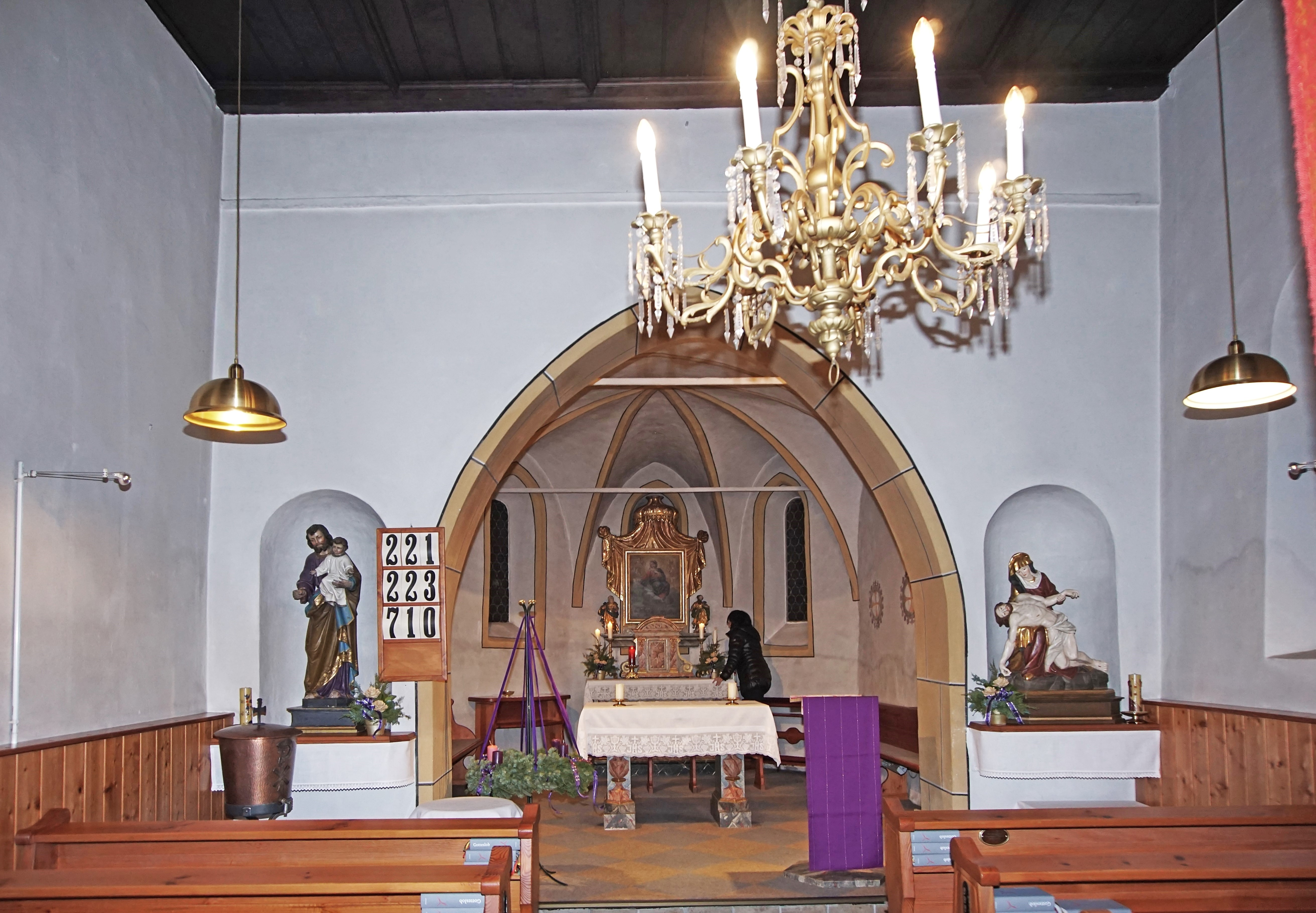 Kath. Filialkirche St. Johann in Steindorf am Ossiacher See, Innenansicht